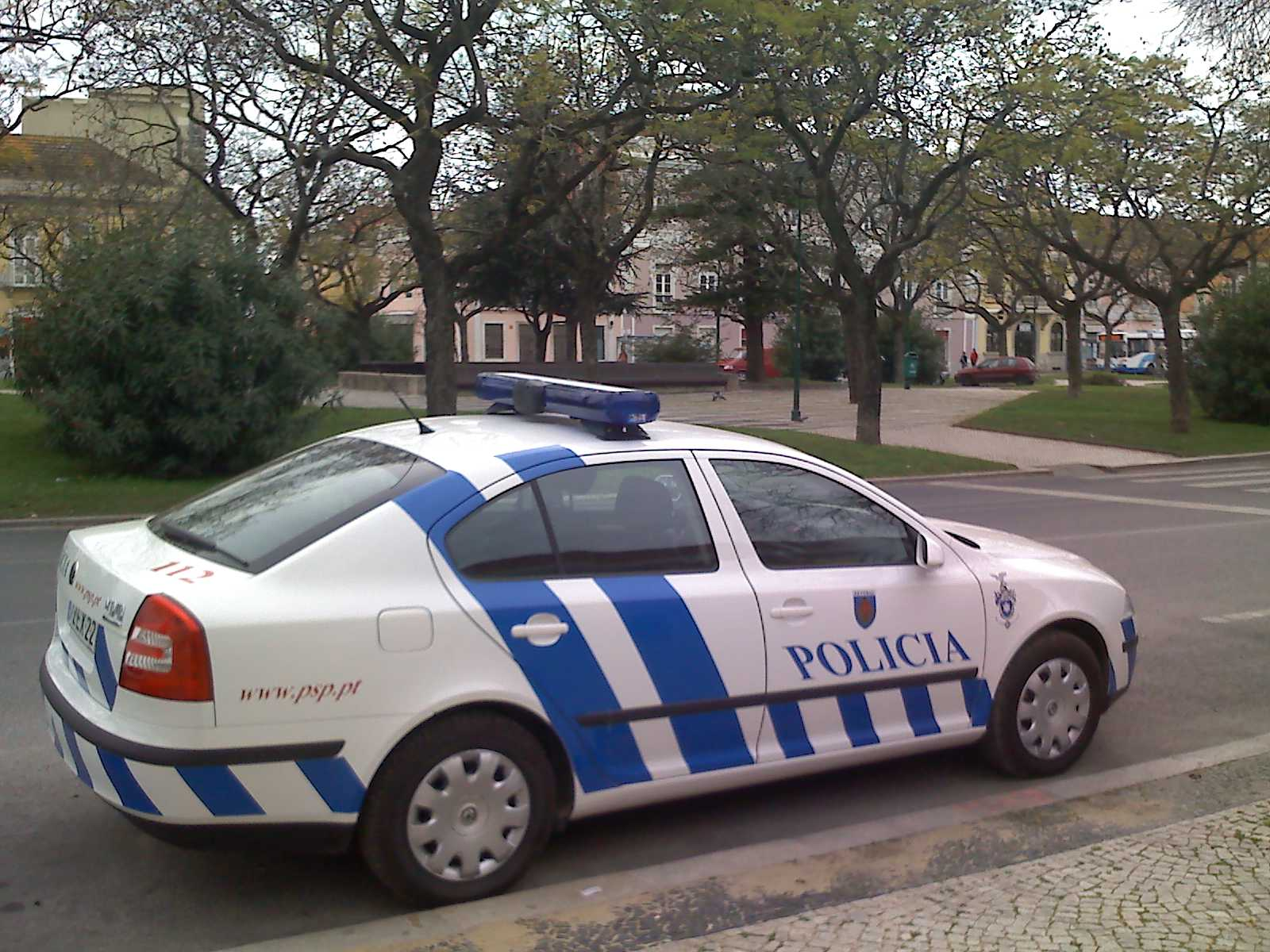 Portuguese Public Security Police Skoda Octavia patrol car